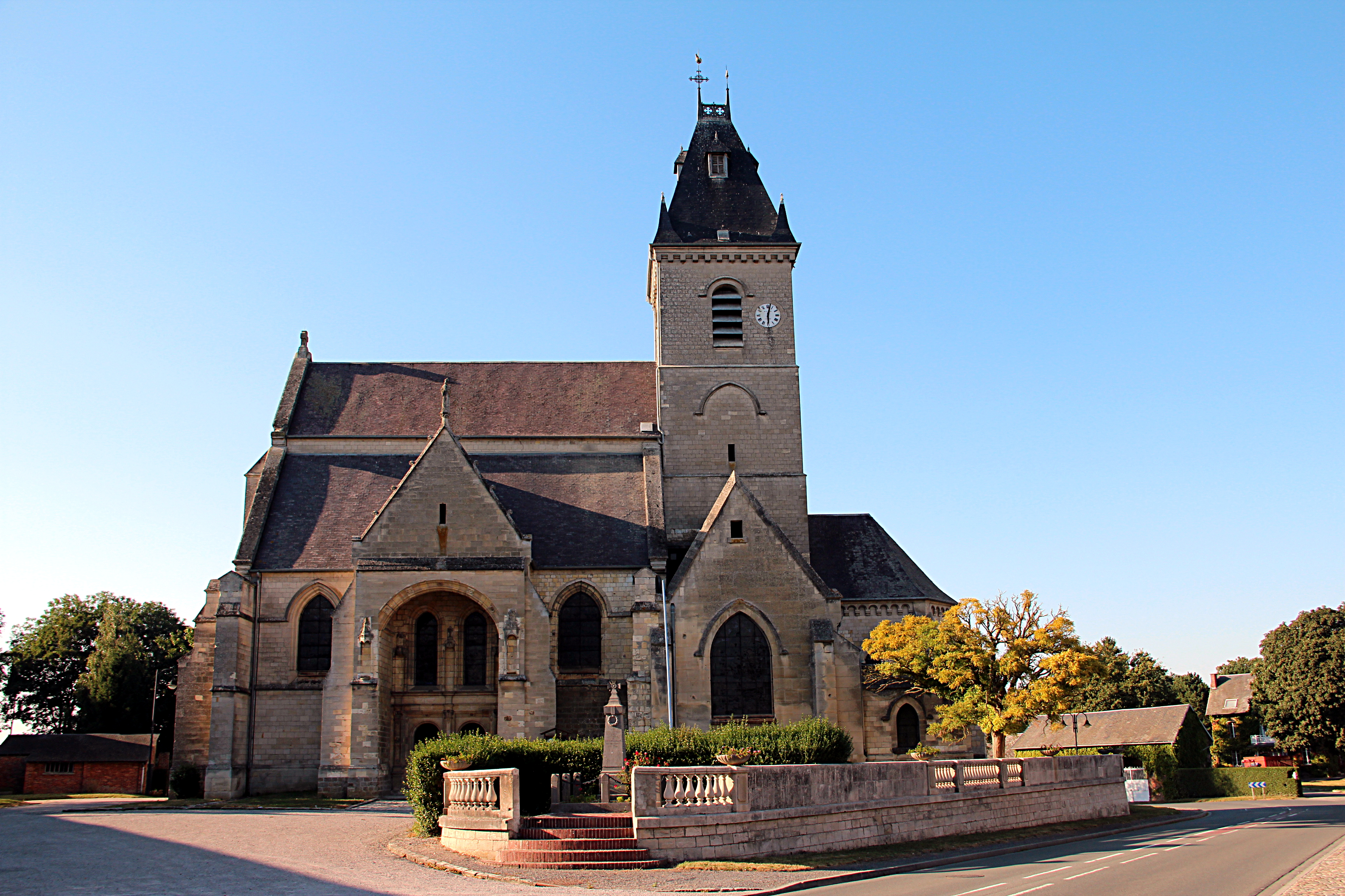 Église Saint-Médard de Croix-Mouligneaux (Somme, France).